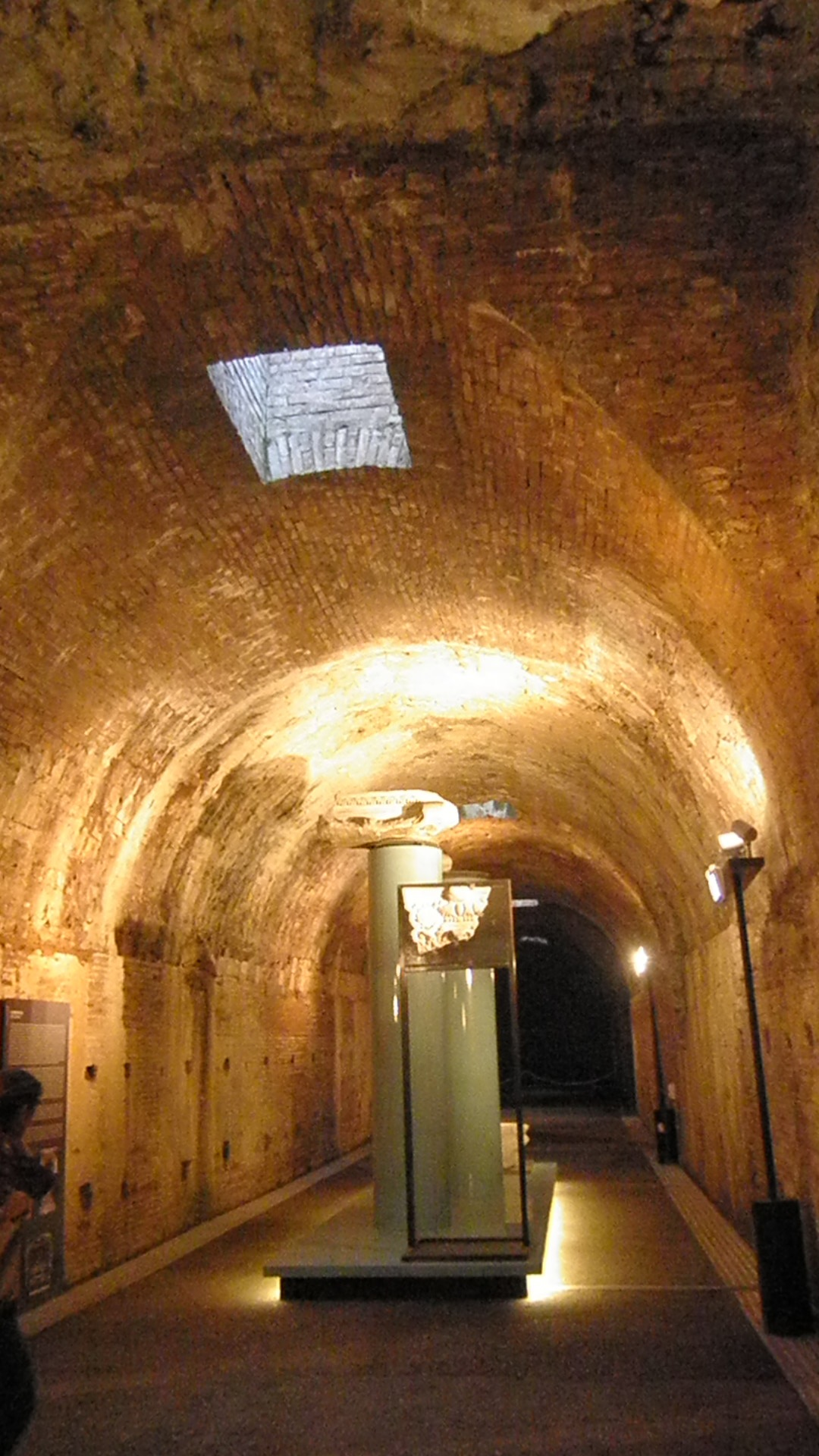 Roma, Terme di Caracalla. Ambienti di servizio sotterranei, liv. 1.